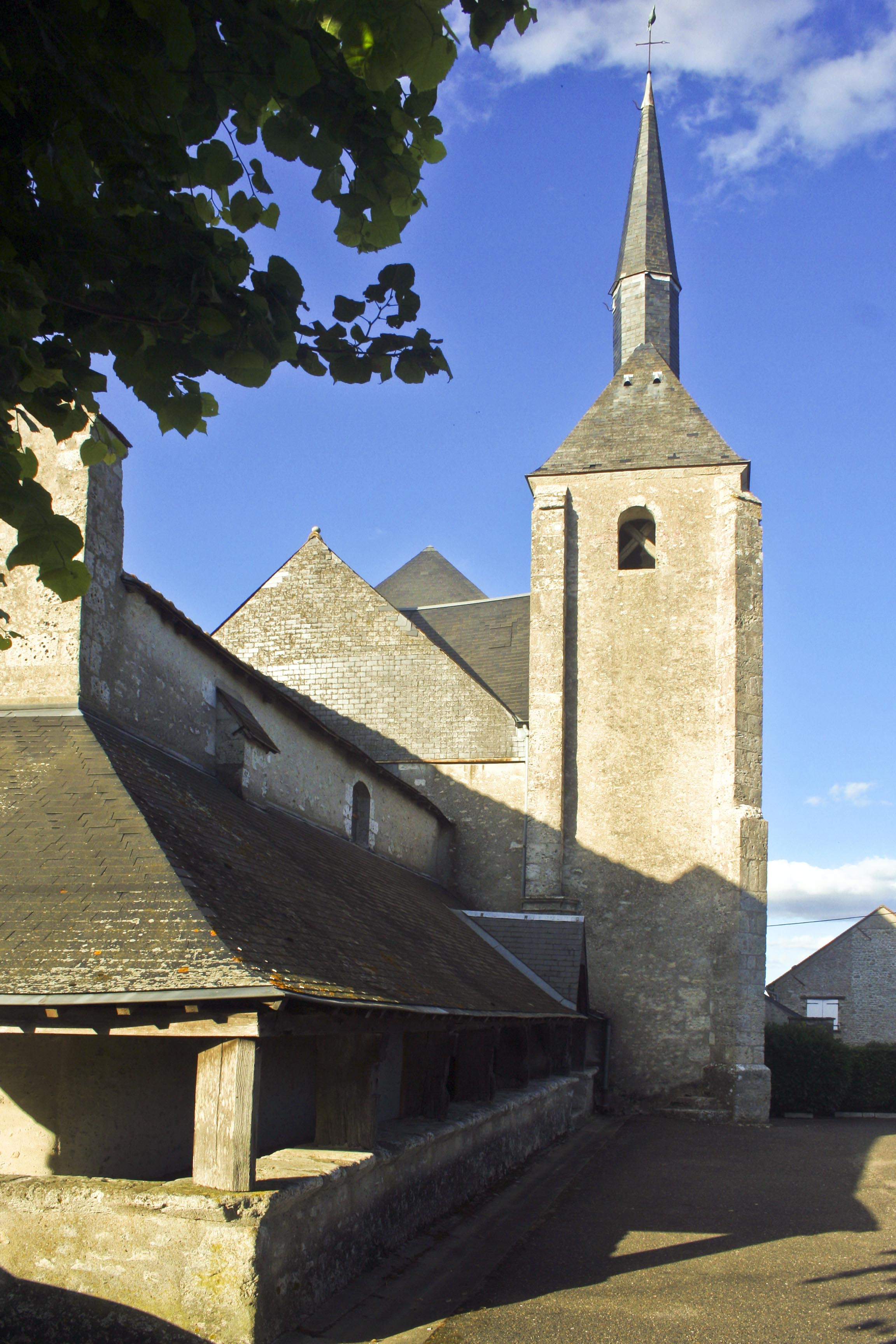 Église de Villexanton (Loir-et-Cher)